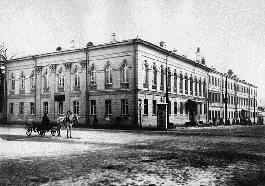 Удельная контора на Большой Печерской улице. Нижний Новгород